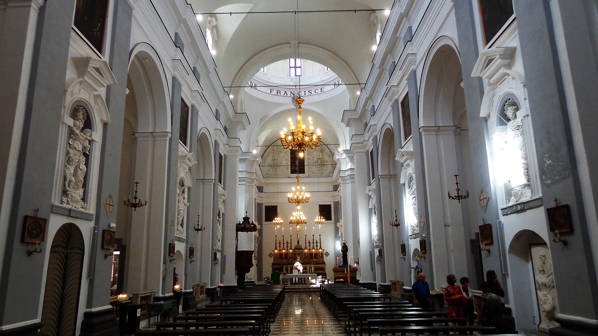 Scultura di Virtù Morale di Cristoforo Milanti